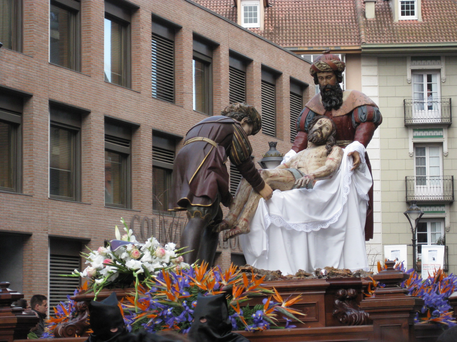 Paso de Cristo de la Cruz a María. Cofradía de Nuestra Señora de la Piedad, Valladolid (España).